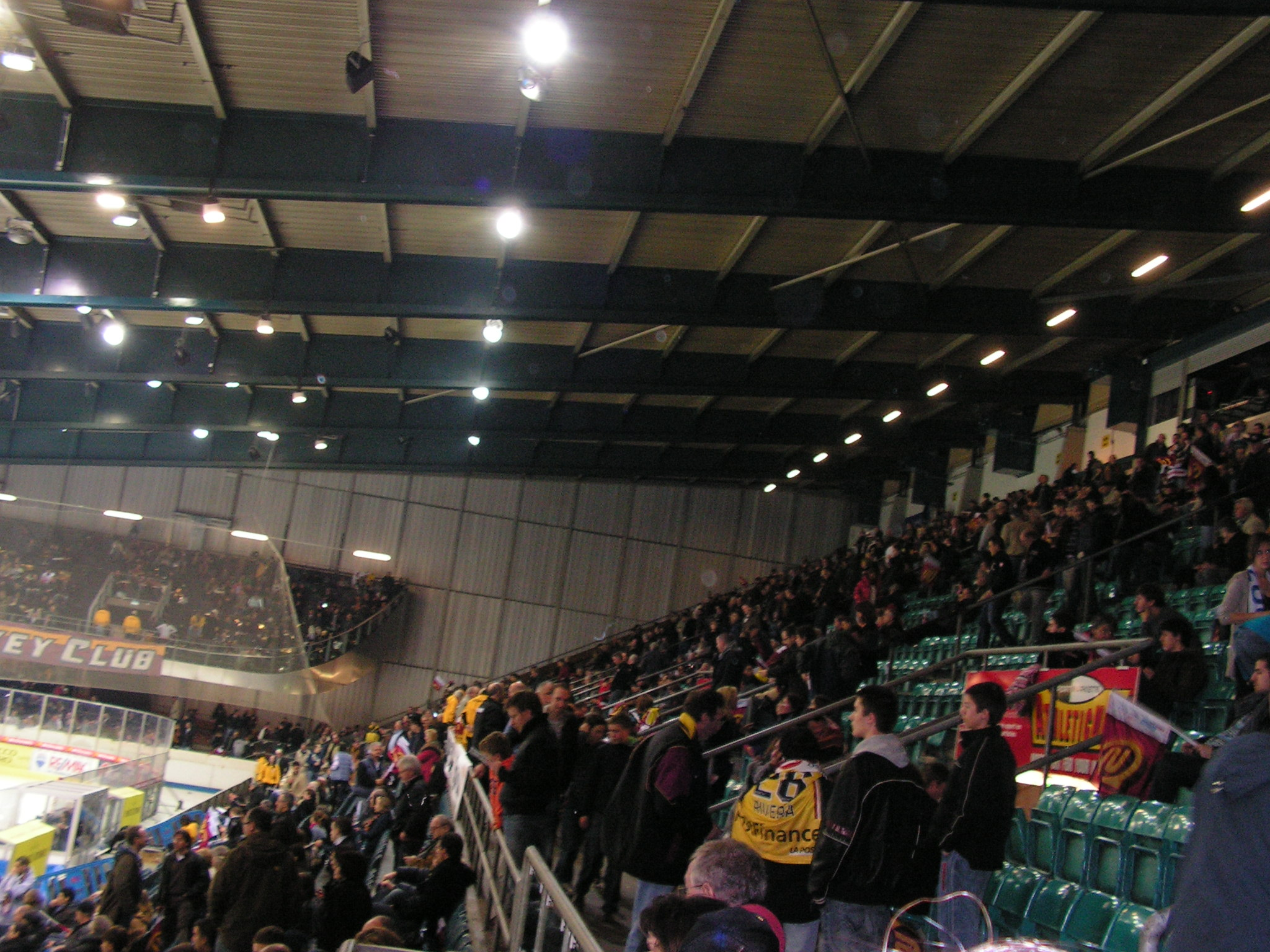 Photo réalisée en Mars 2010 à l'occasion d'un match de playoff face à Zoug